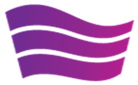 Symbol of the South Korean Unified Progressive Party